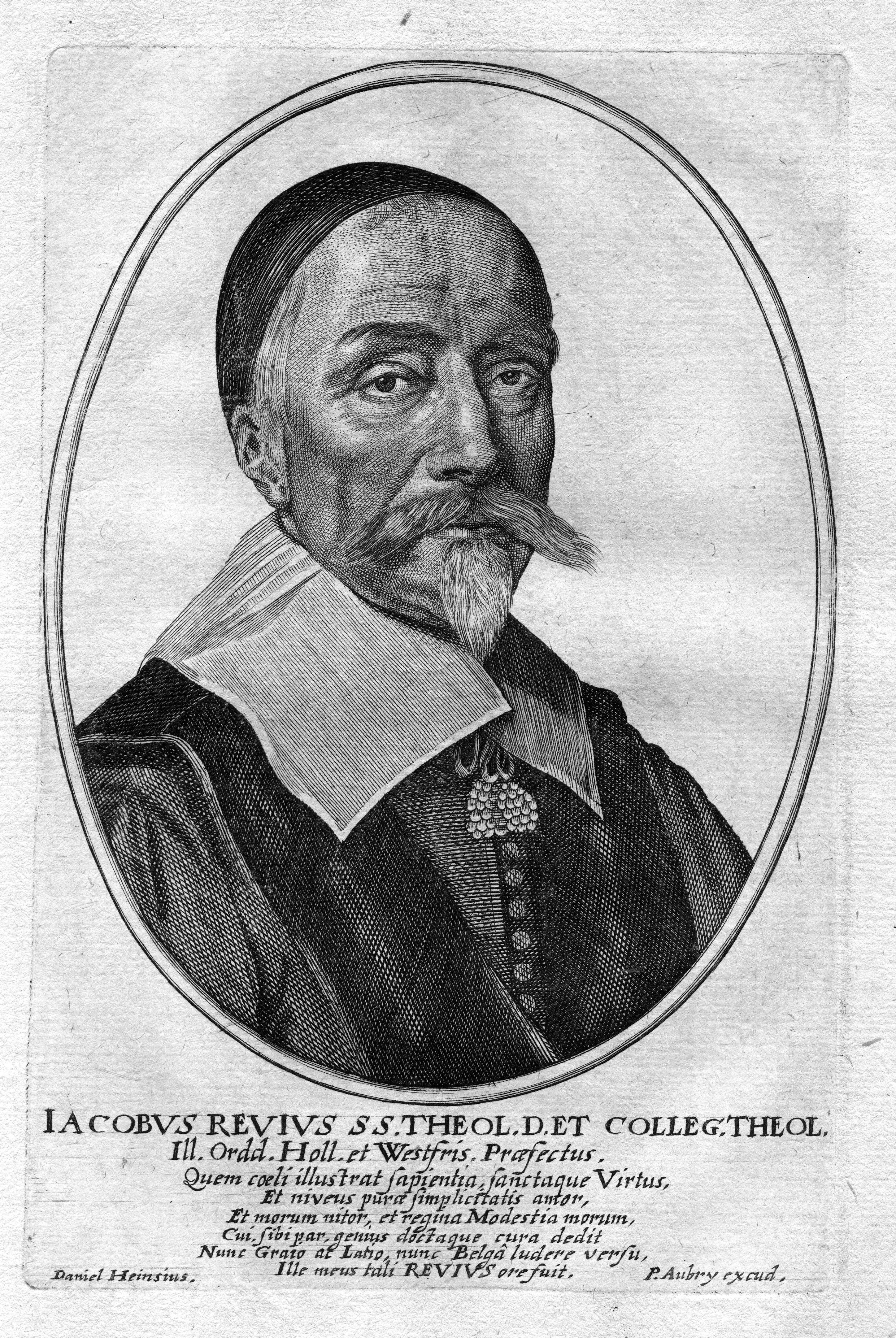 portrait gravé